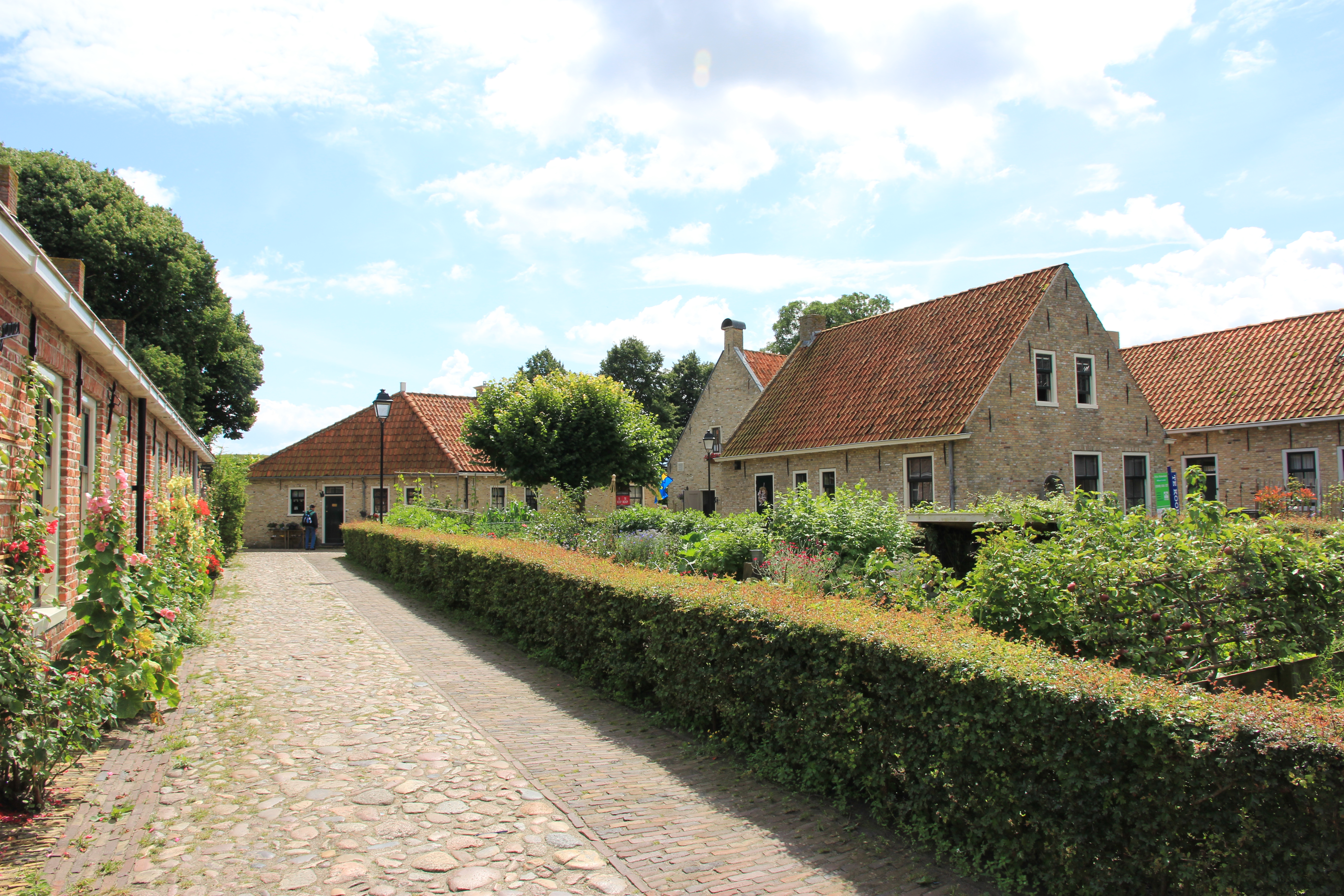 Festung Bourtange